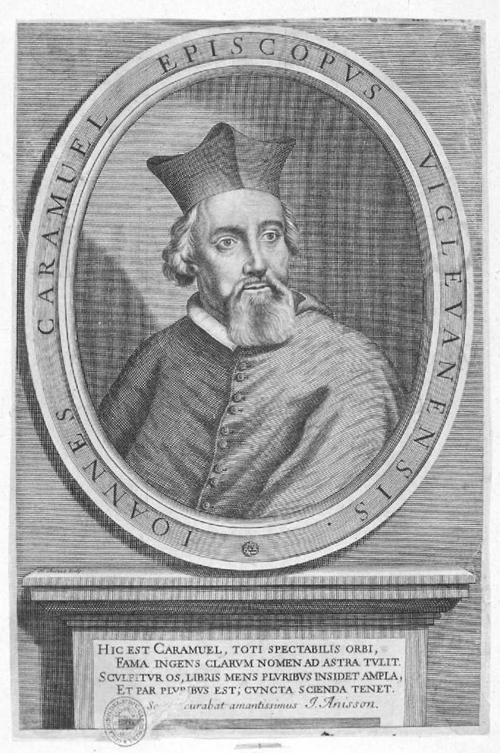 Retrato de Juan Caramuel Lobkowitz, ilustración de Ioannis Caramuel Theologiae Moralis Fvndamentalis...Lugduni, 1675. Biblioteca Nacional de España